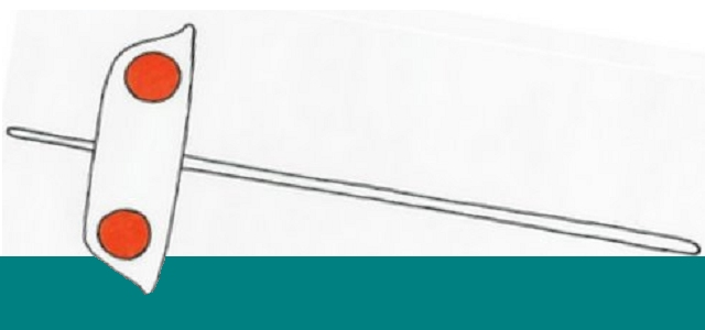 Schema: Gekennterte Jolle - Auftrieb zu hoch (Die Überzeichnung des Winkels den der Mast/das Boot zum Wasser einnimmt ist bewußt.)